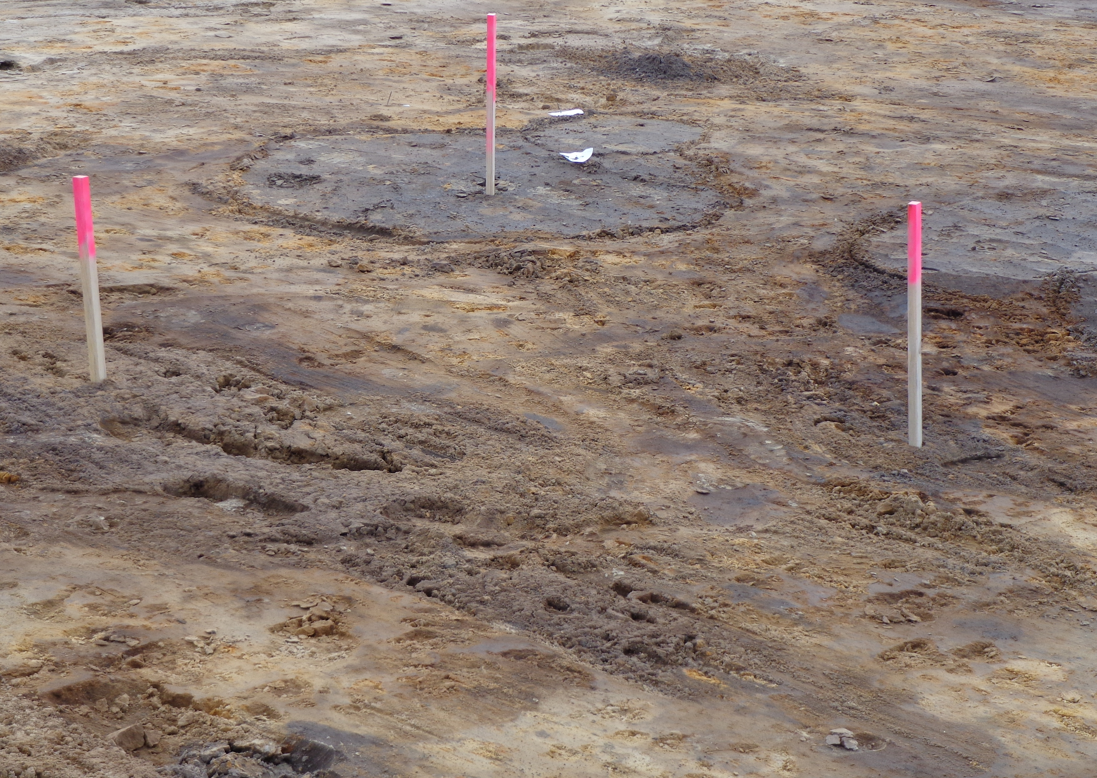 Archeologische opgraving van een boerderij met mogelijke omwalling in 2015 aan de Wencopperweg te Barneveld